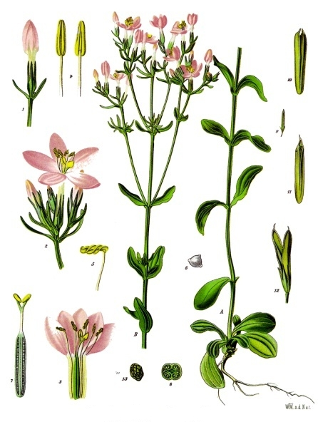 Tausendgüldenkraut. A B Pflanze in natürl. Grösse; 1 Blüthe, vergrössert; 2 Blüthenzweig, desgl.; 3 auseinandergelegte Blüthe, desgl.; 4 Staubgefässe, desgl.; 5 Staubgefäss nach dem Verstäuben, desgl.; 6 Pollen, desgl.; 7 Stempel, desgl.; 8 Fruchtknoten im Querschnitt, desgl.; 9 Frucht, natürl. Grösse; 10 u. 11 geöffnete Kapsel, vergrössert; 12 dieselbe mit Kelch, desgl.; 13 Same, desgl.